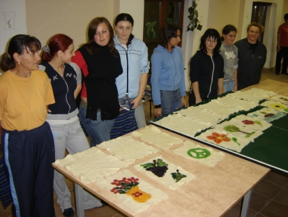 Klub mladih i međugeneracijske solidarnosti Kozarac, Kozarac, filcanje vune